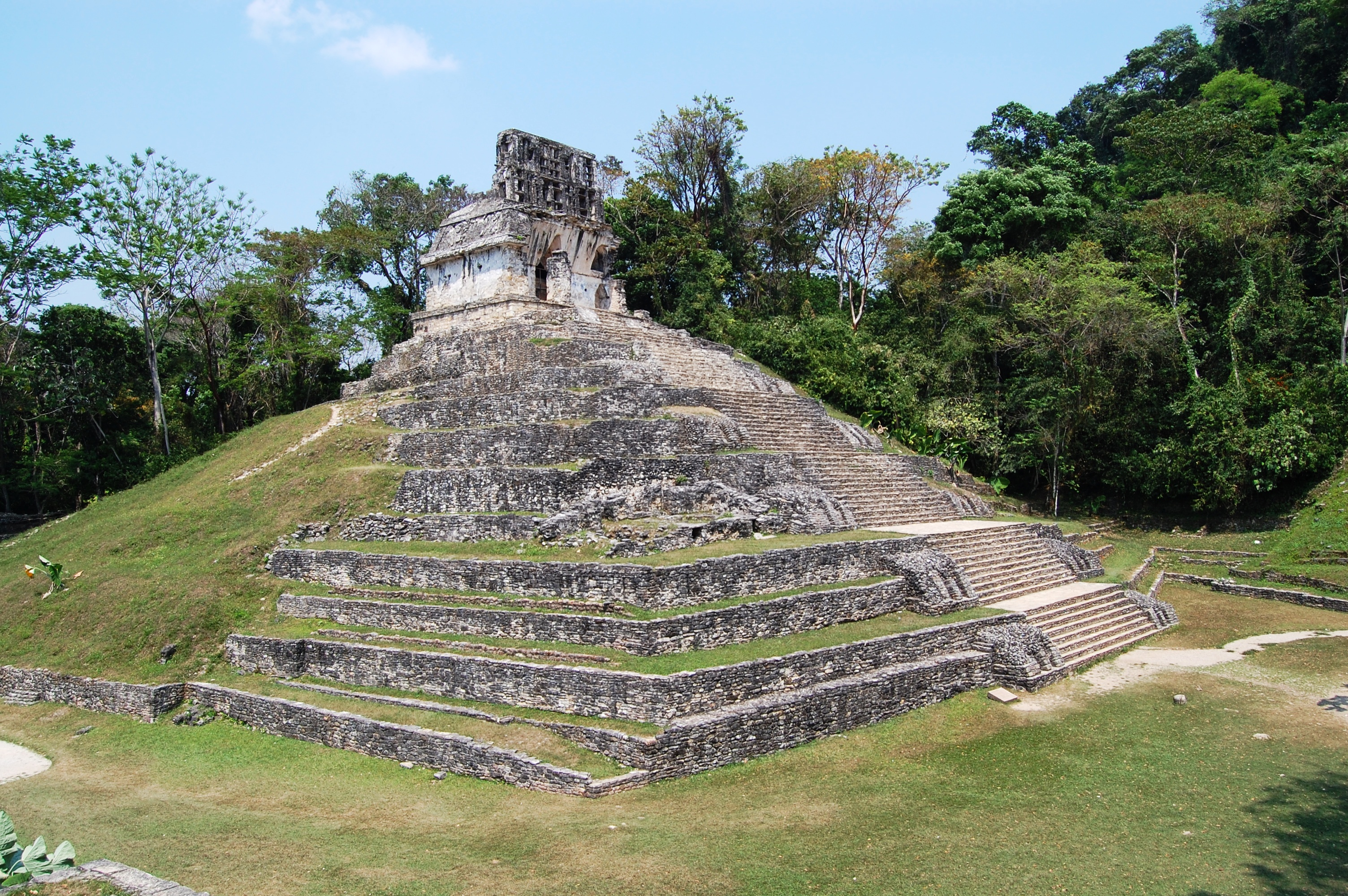 Palenque, Mexico